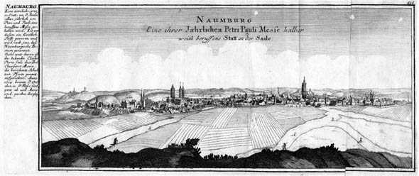 Ansicht von Naumburg Anfang des 18.Jhdt.